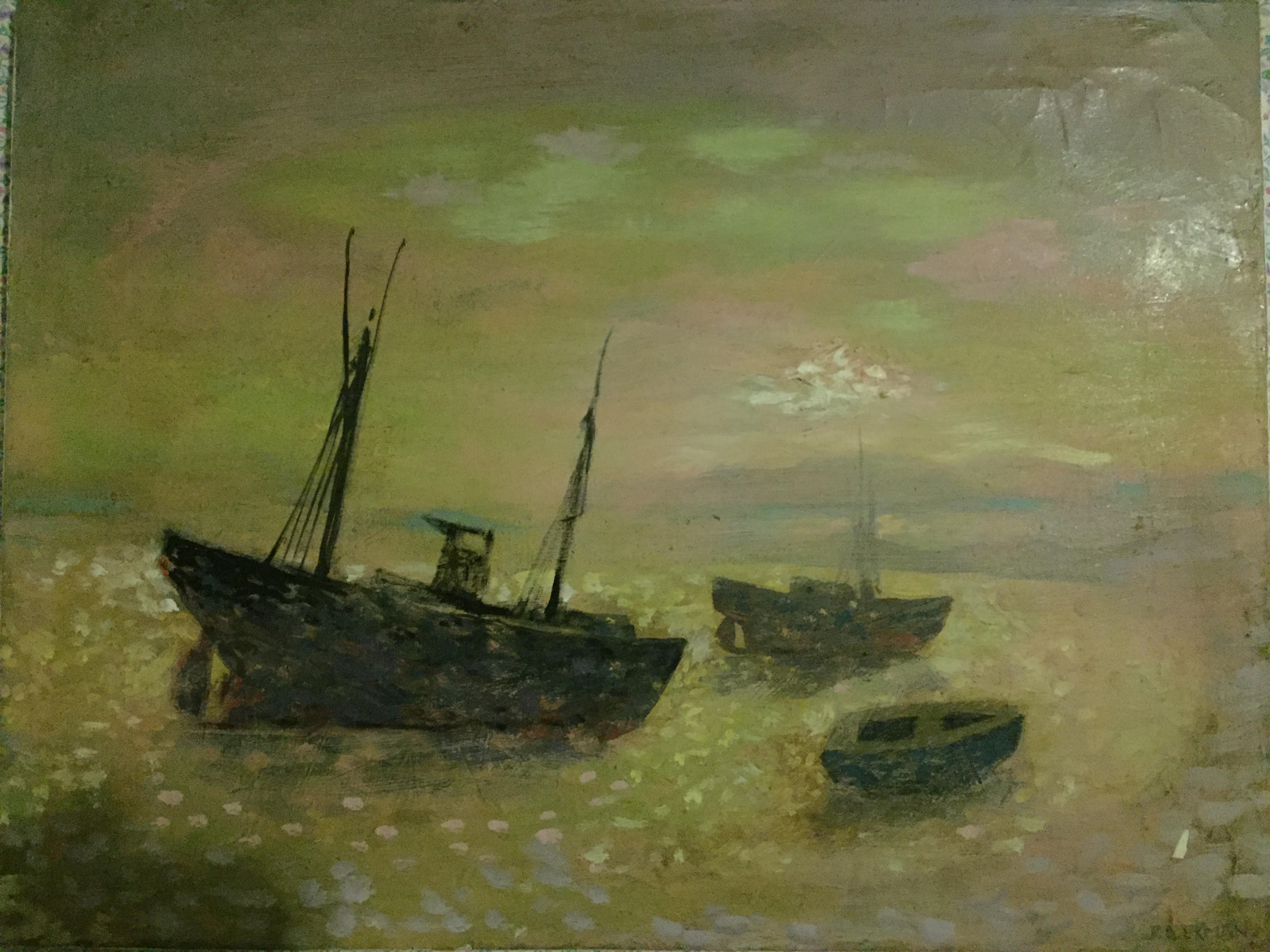 tableau 46 x 60